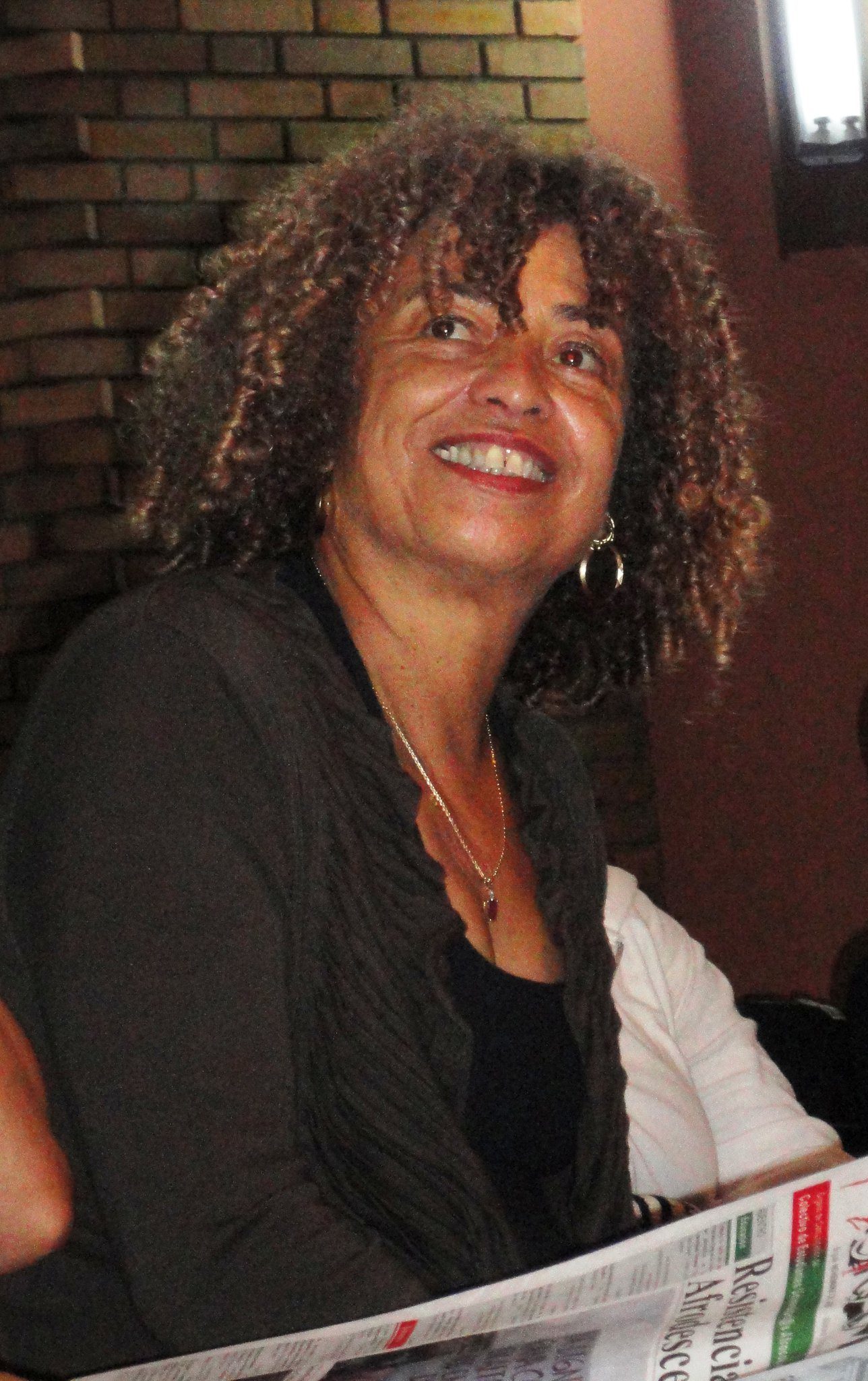 Angela Davis en la Unversidad Nacional Bogotá. Taller: encontrándonos con Angela.